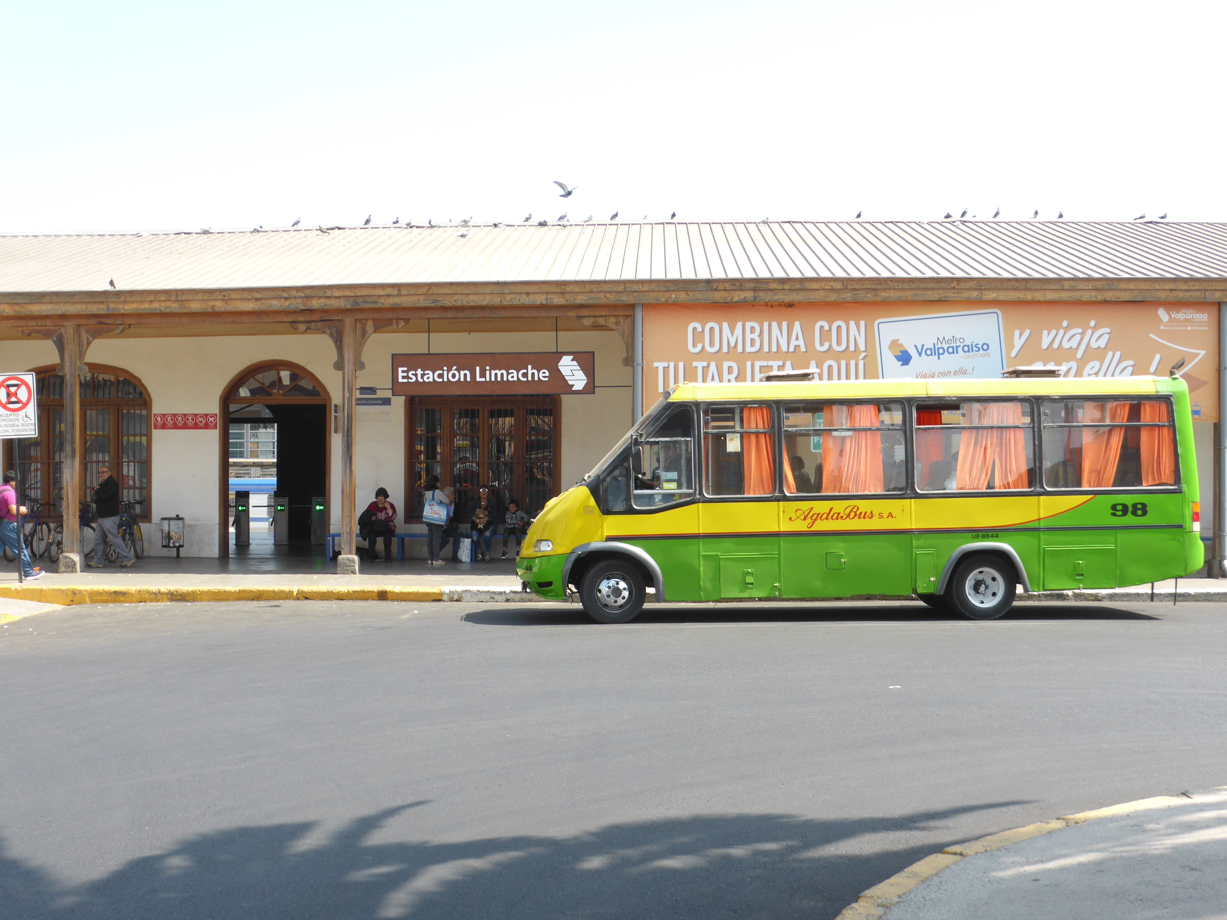 La estación de Limache forma parte del servicio de metro del Gran Valparaíso. Metro de Valparaíso S.A. (MERVAL), es una filial de la Empresa de Ferrocarriles del Estado (EFE).